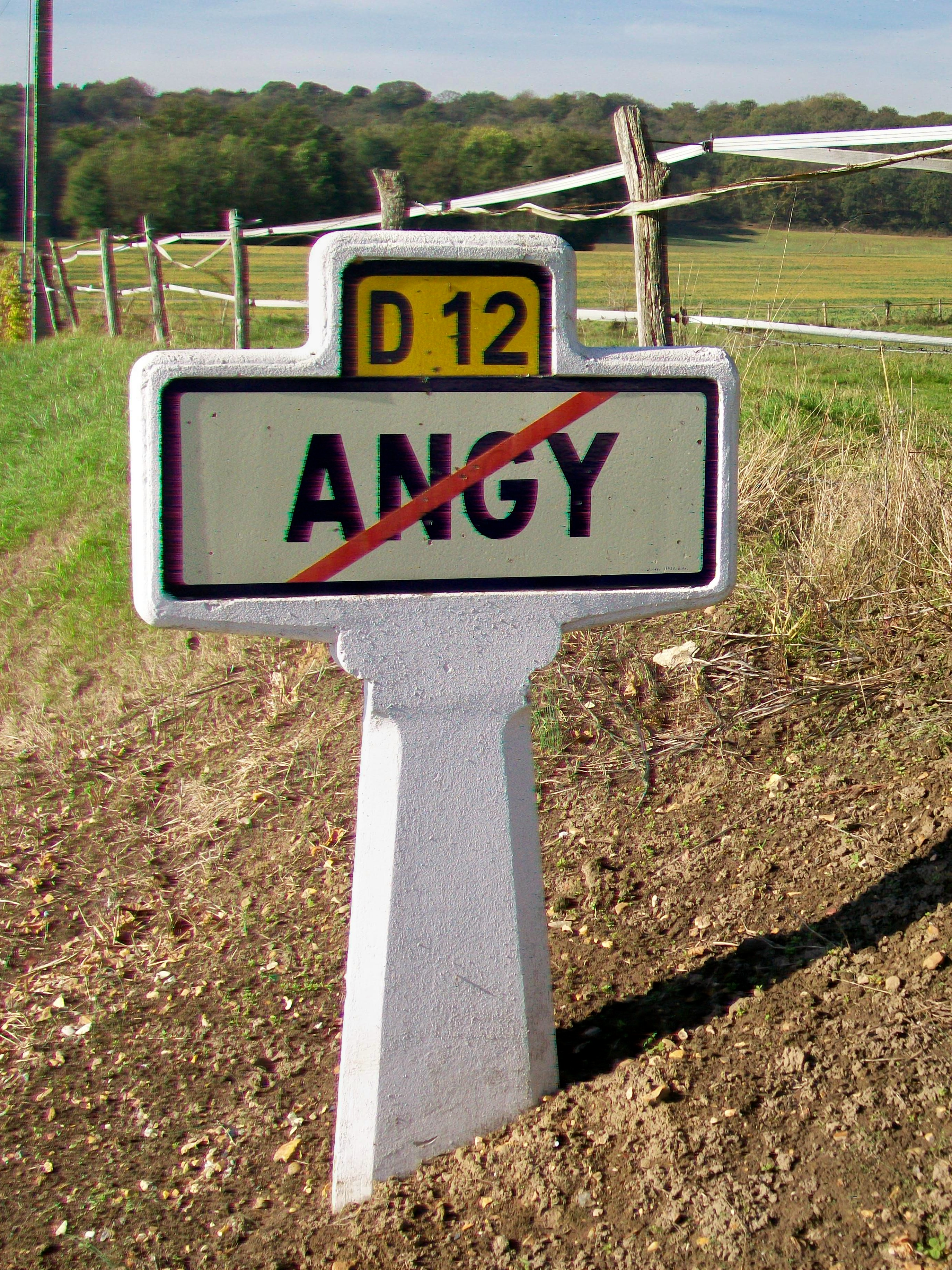 Plaque Michelin de 1959 à la sortie nord du village. La RD 12 dispose aujourd'hui d'une déviation et ne passe plus par ici.